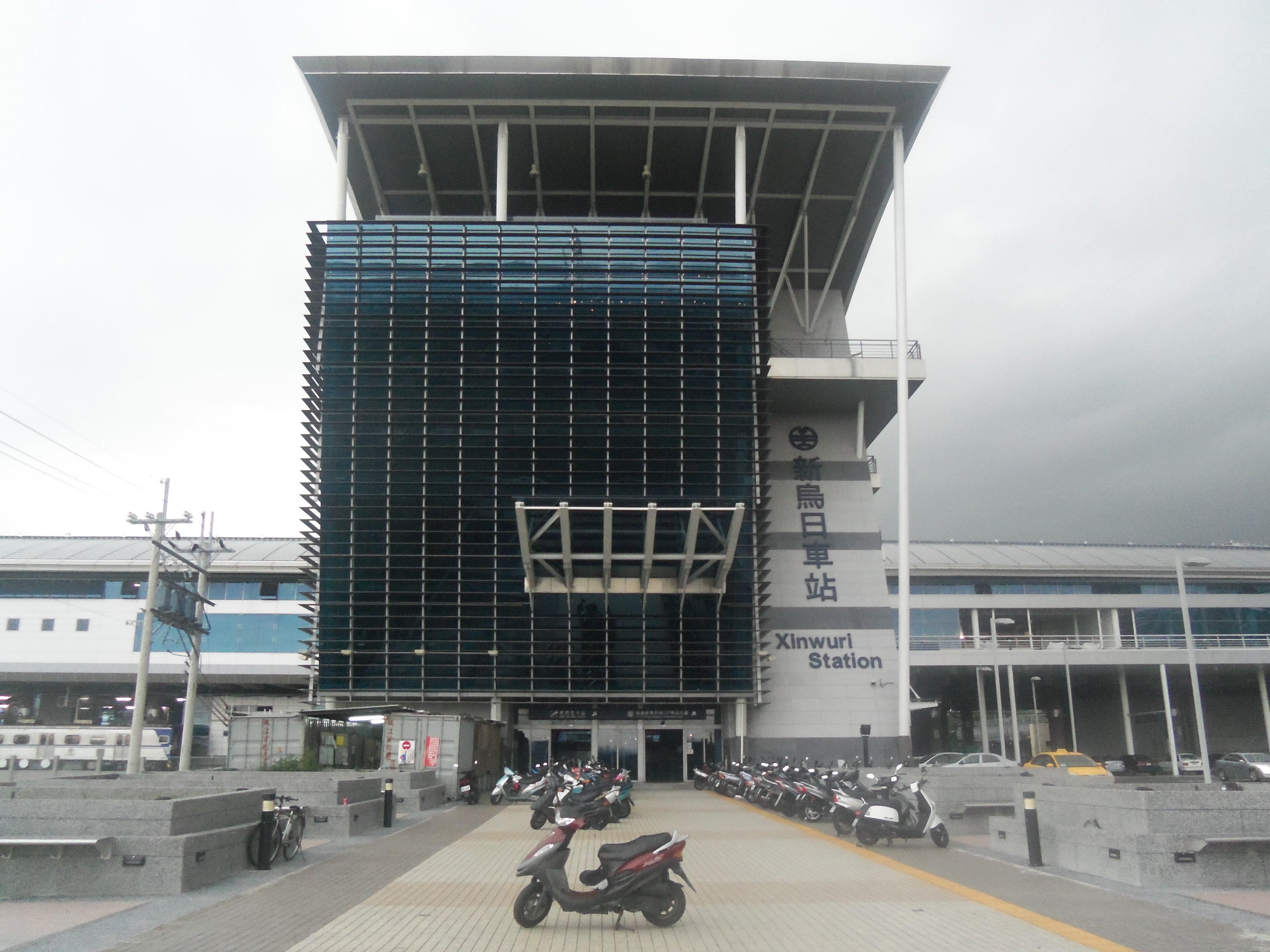 中文（台灣）: 新烏日車站。